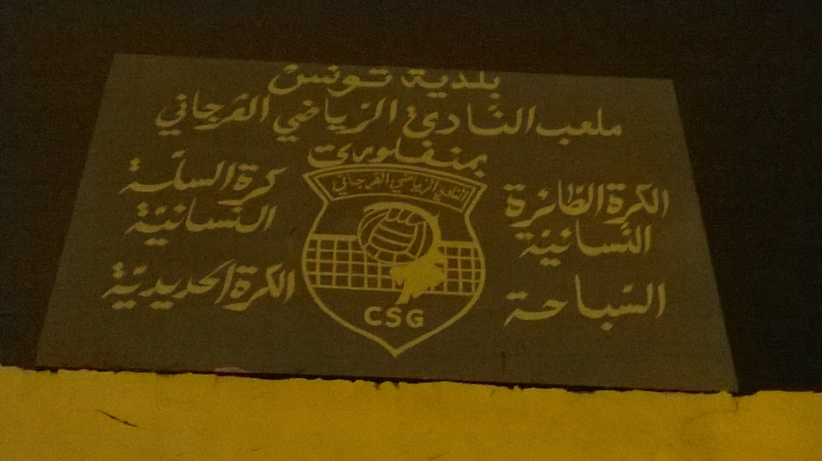 Montfleury , Tunis